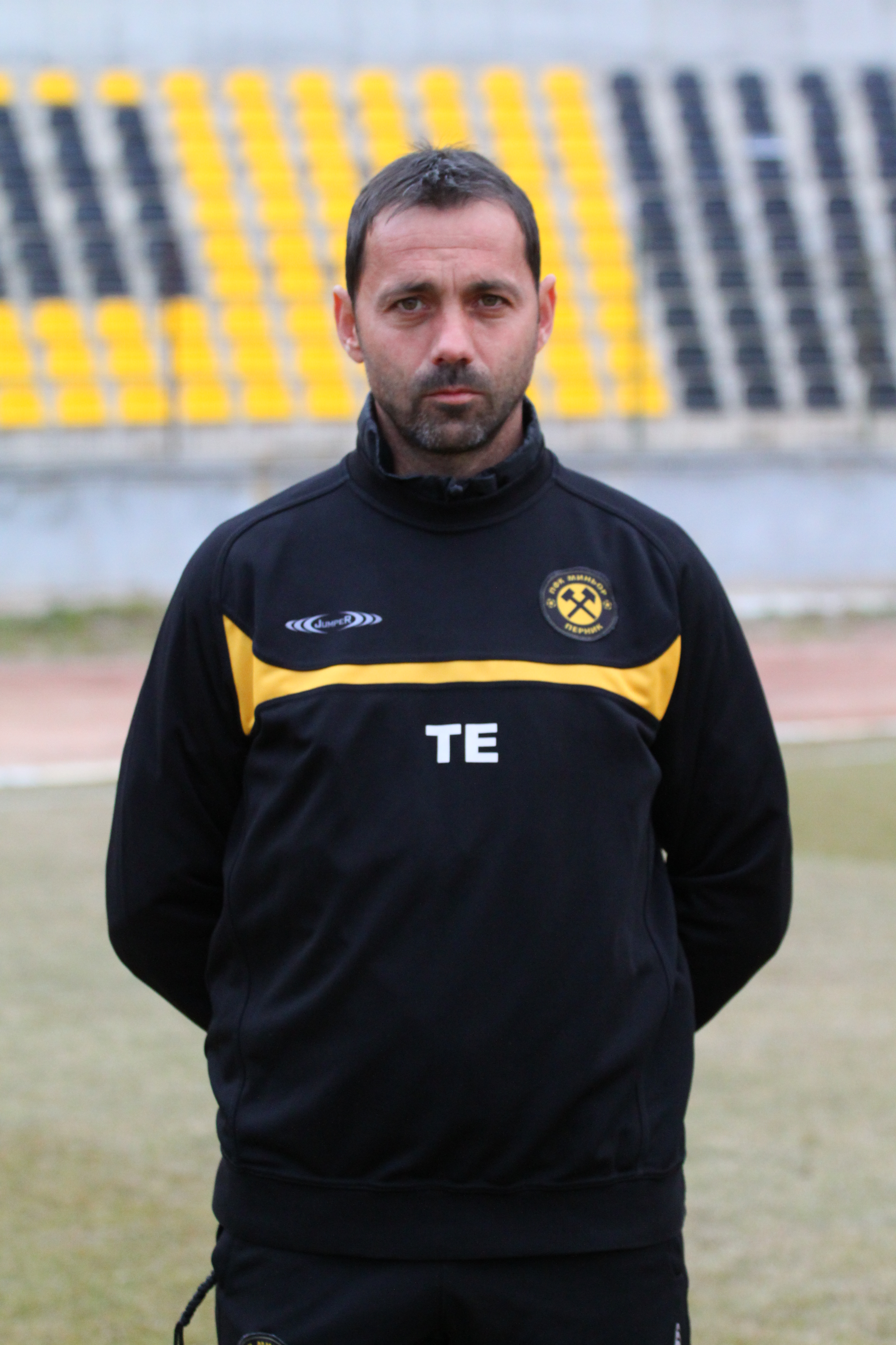 Антон Евтимов - бивш български футболист, пом. треньор на Миньор Пк.